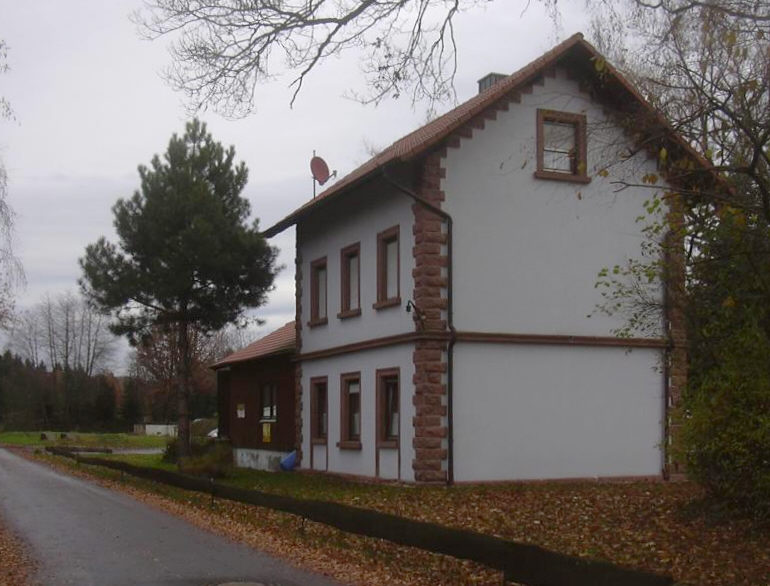 Ehemaliger Bahnhof des Odenwaldexpresses in Fahrenbach